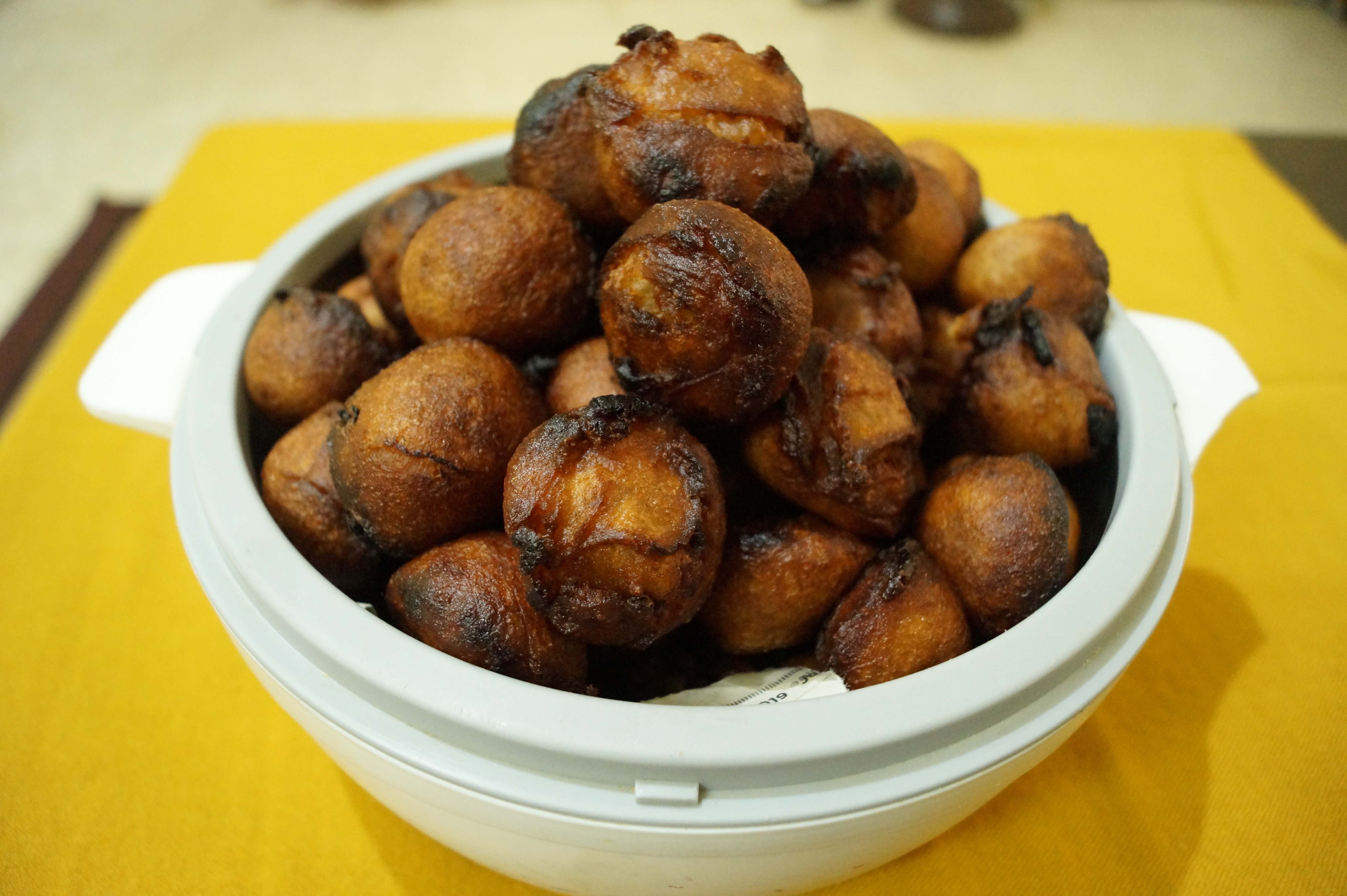 ഉണ്ണിയപ്പം, കാരോലപ്പം